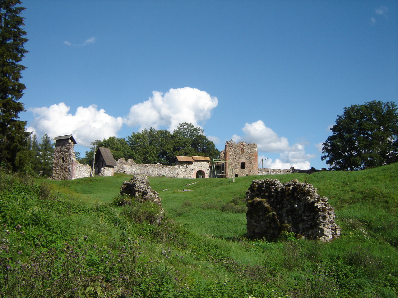 Karksi ordulinnuse varemed. Sisehoov ja üles tõsteteva silla alusmüür.